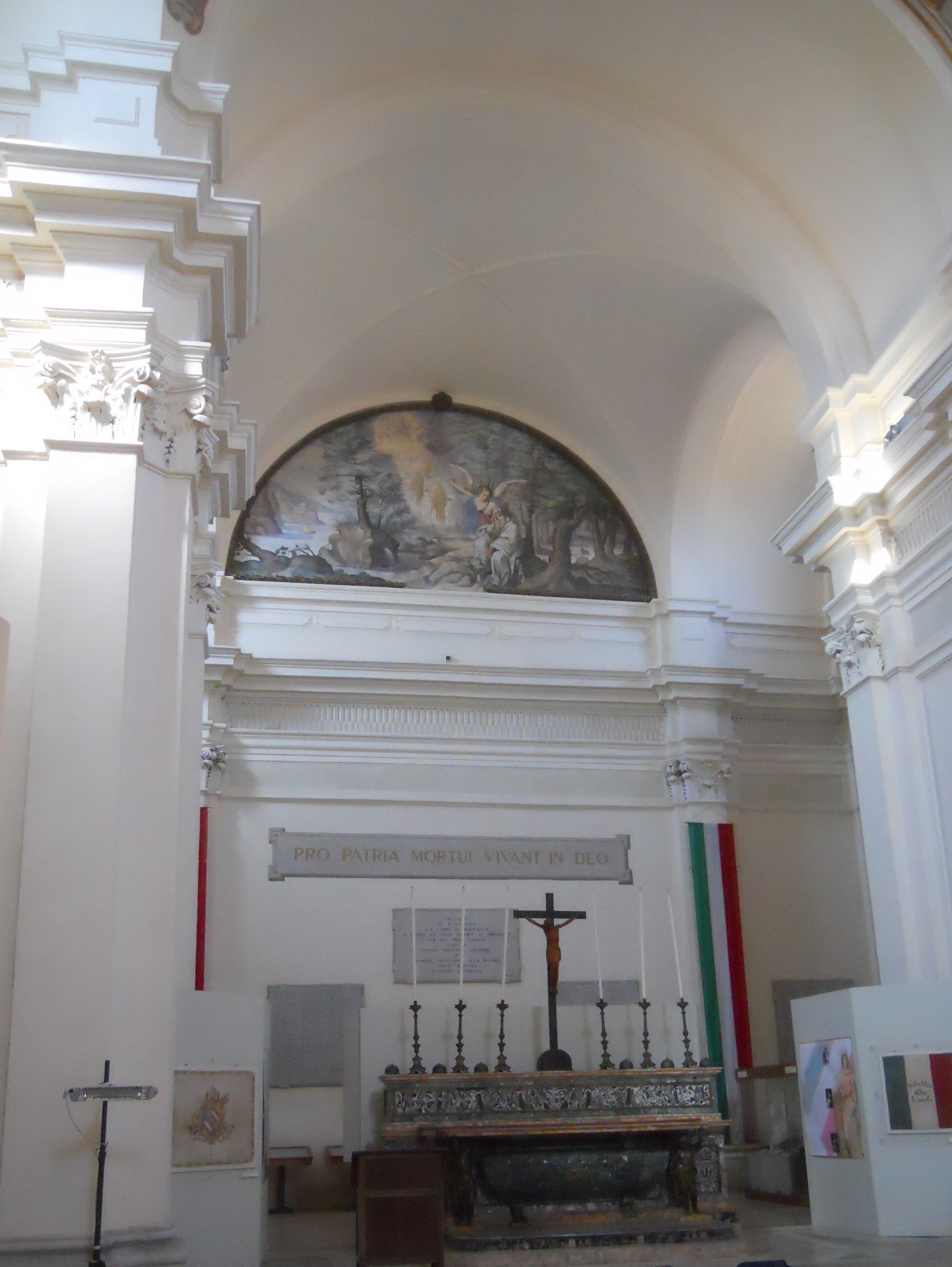 L'abside e l'altare maggiore della chiesa di San Romualdo a Ravenna